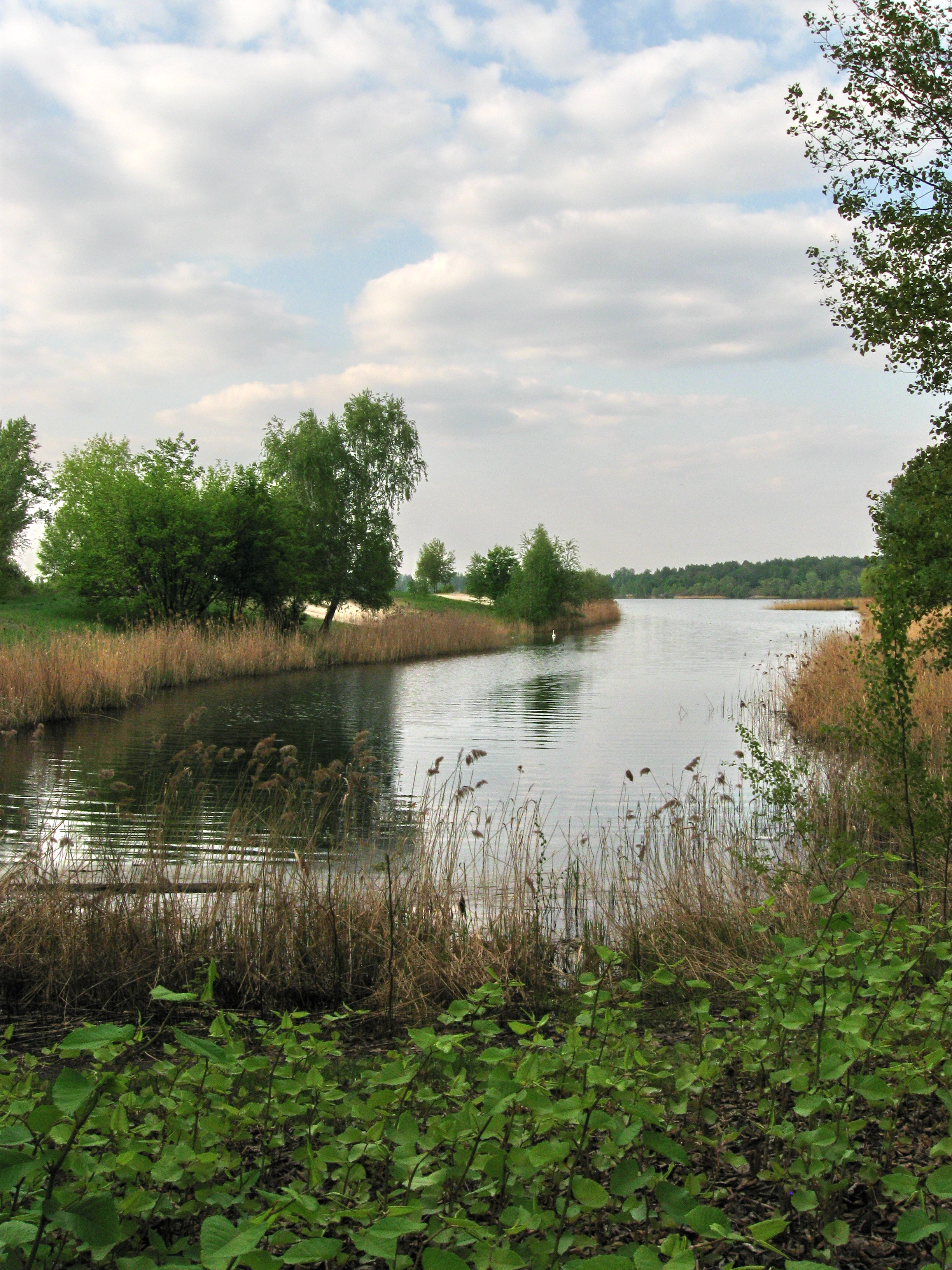 Dąbrowa Górnicza Łęknice - fragment zbiornika Pogoria III